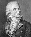 French poet Ponce-Denis Écouchard-Lebrun (1729-1807)